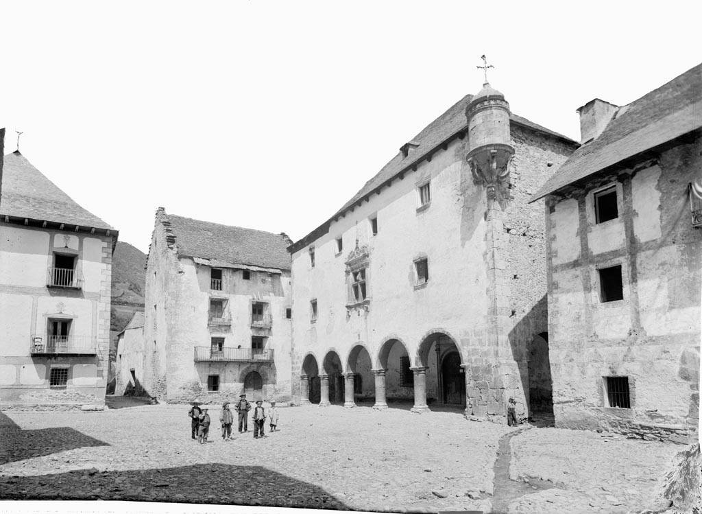 Imatge